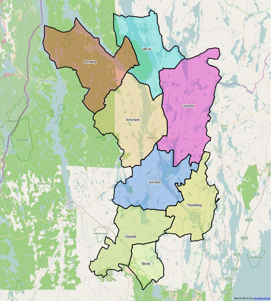 Distriktsindelningen i Bengtsfors kommun